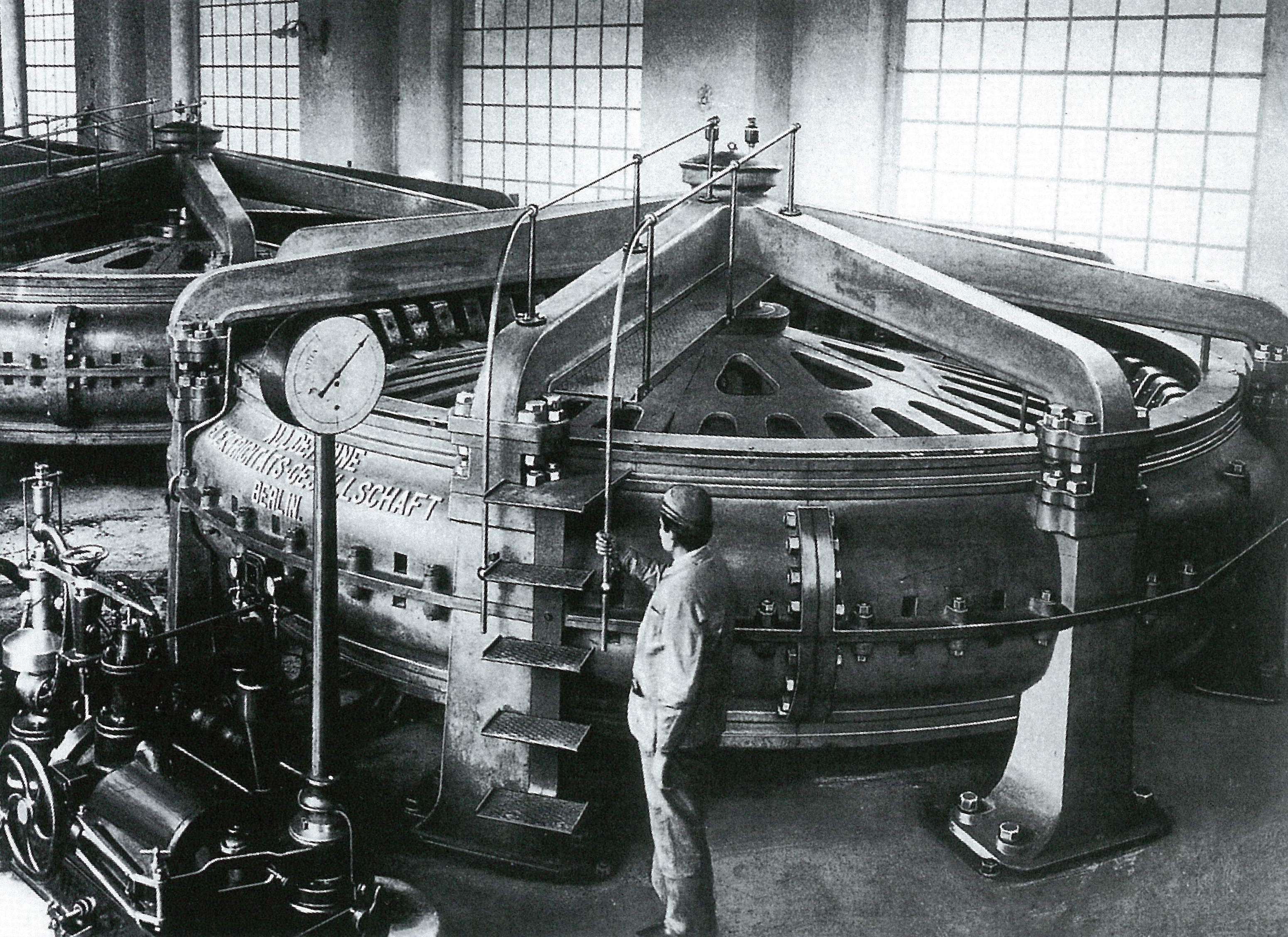 Drehstromgenerator im alten Wasserkraftwerk Rheinfelden.